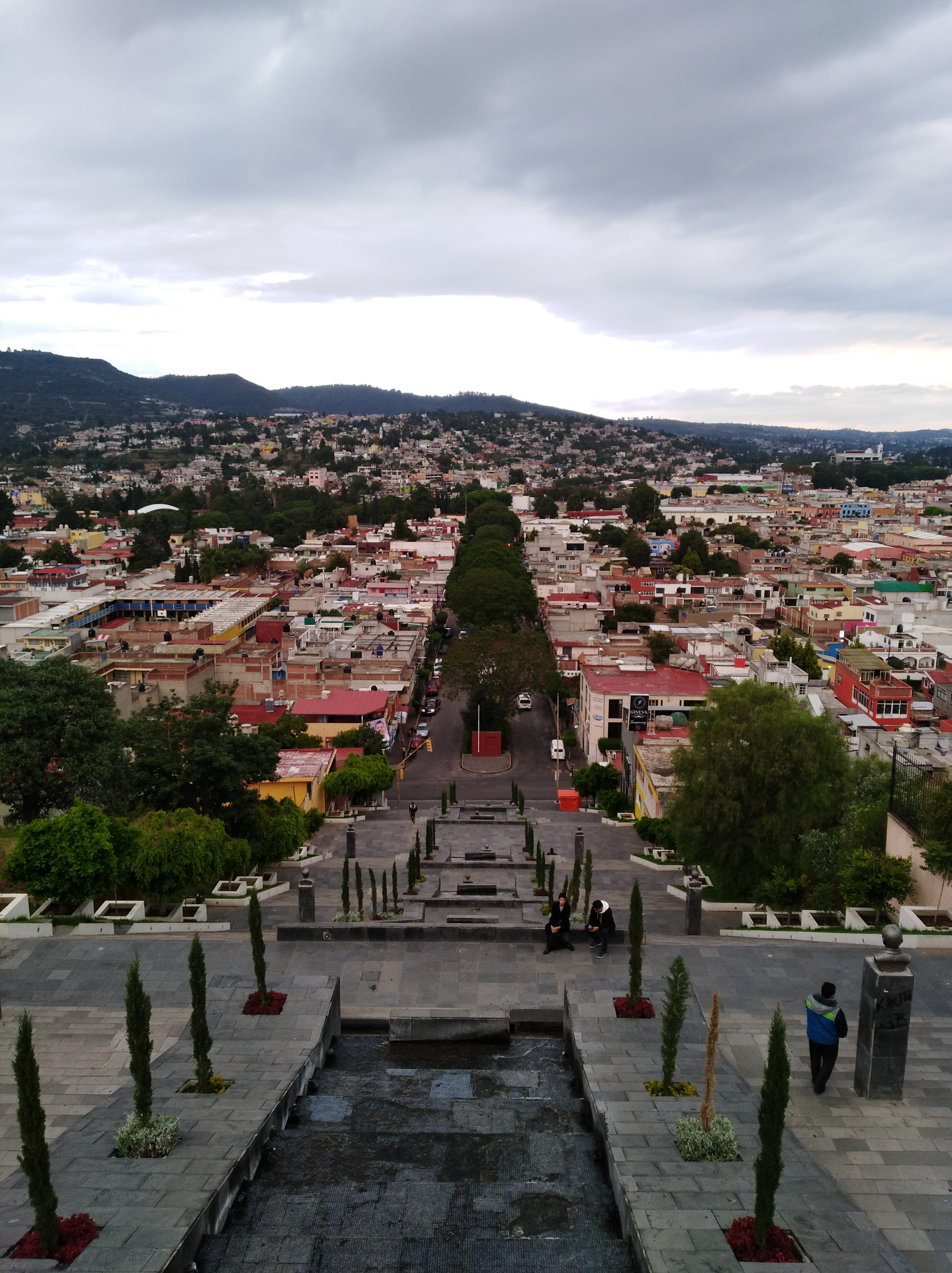 En Tlaxcala